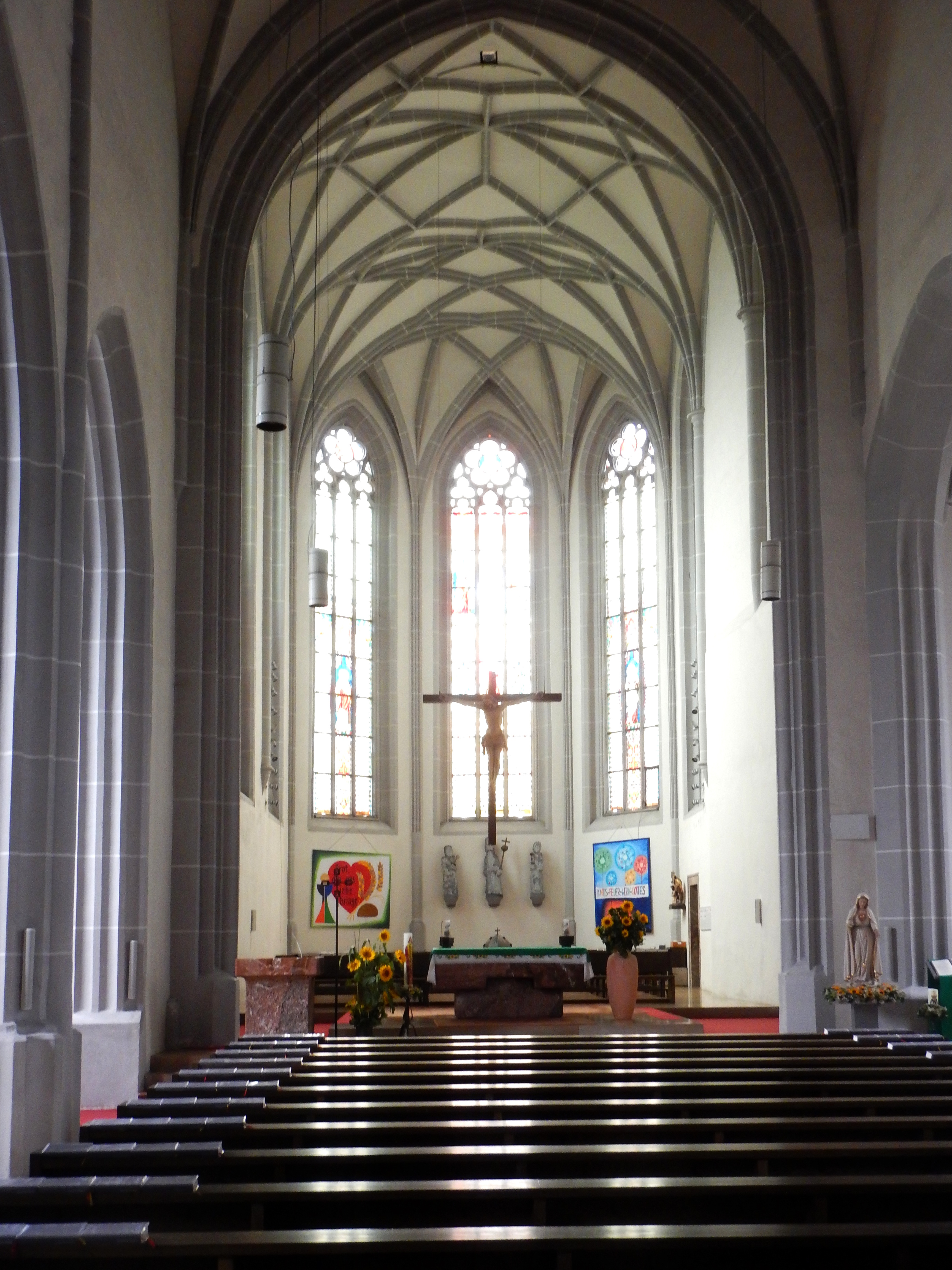 Stadtpfarrkirche hl. Michael